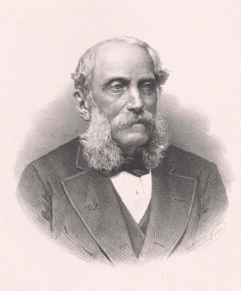 Adalbert svobodný pán Widmann (1804 - 1888), Moravský politik a velkostatkář.